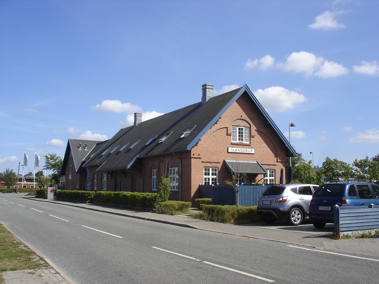 Slangerup Station fra nord